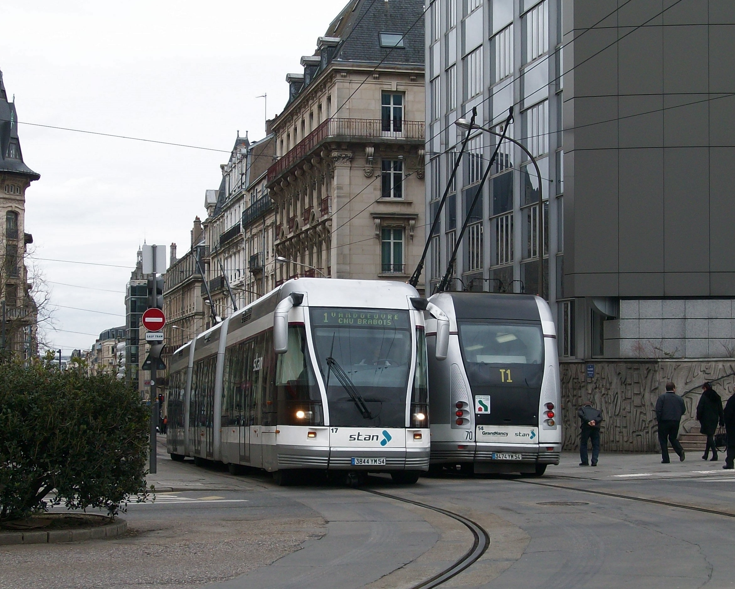 Rames TVR n°17 & 14 à la gare de Nancy